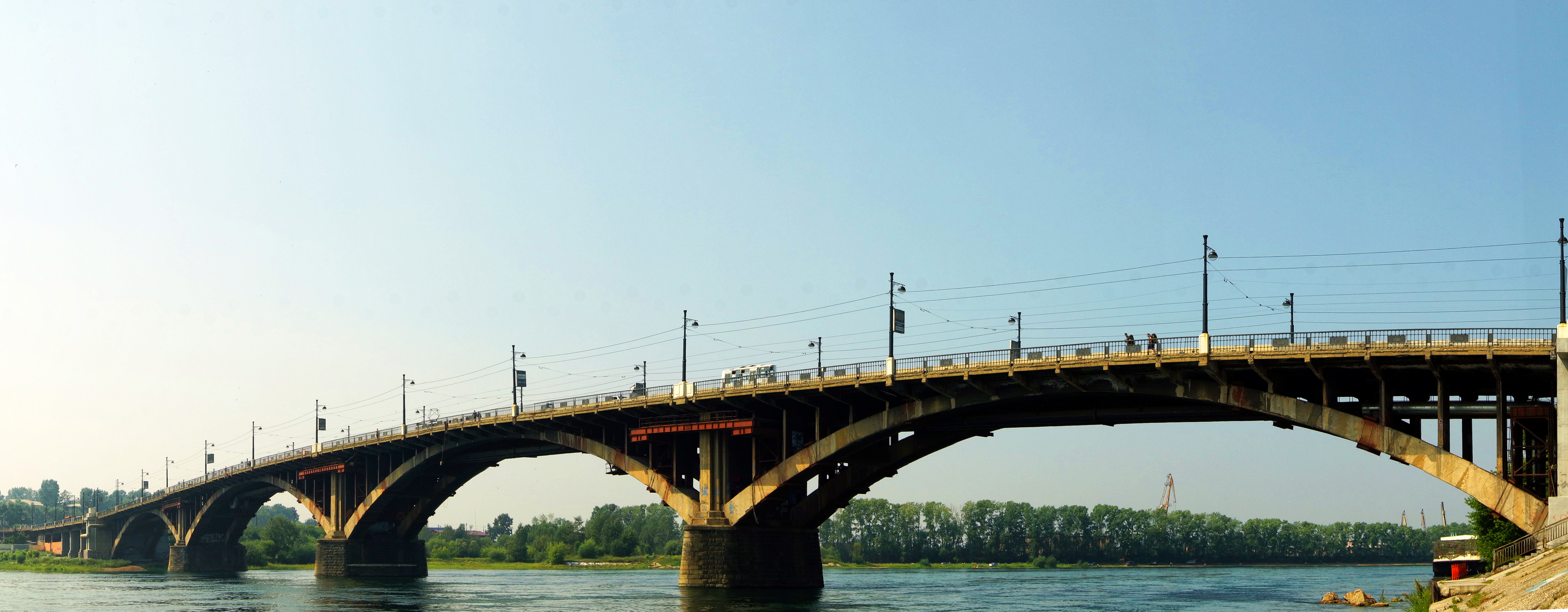 Мост ( верхний мост), сооруженный в память В.И. Ленина: р. Ангара, в створе улиц Чкалова и Маяковского, Иркутск, Иркутская область